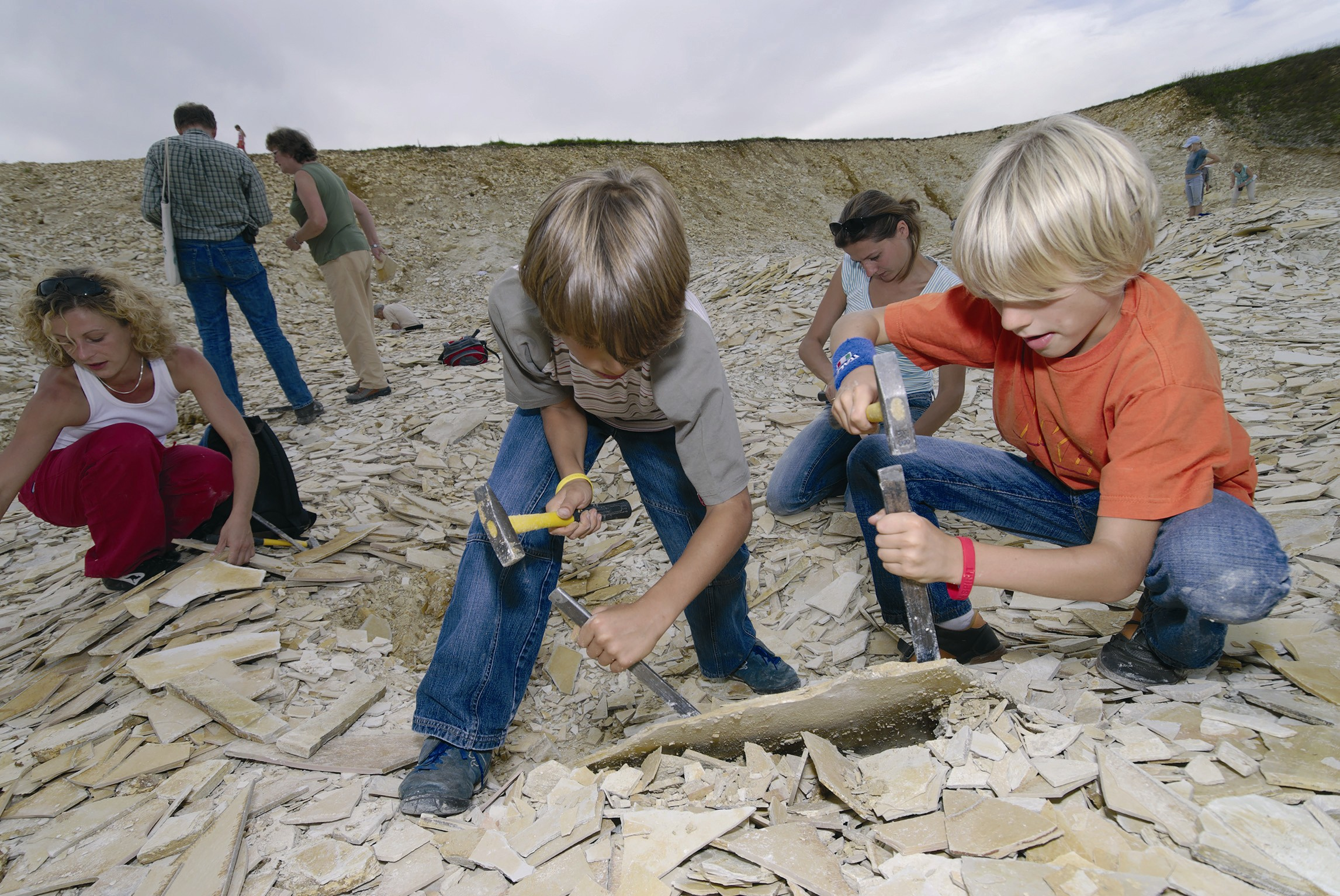 Schatzjäger mit Feuereifer: Fossilien sammeln in den freigegebenen Steinbrüchen des Altmühltals Lizenz